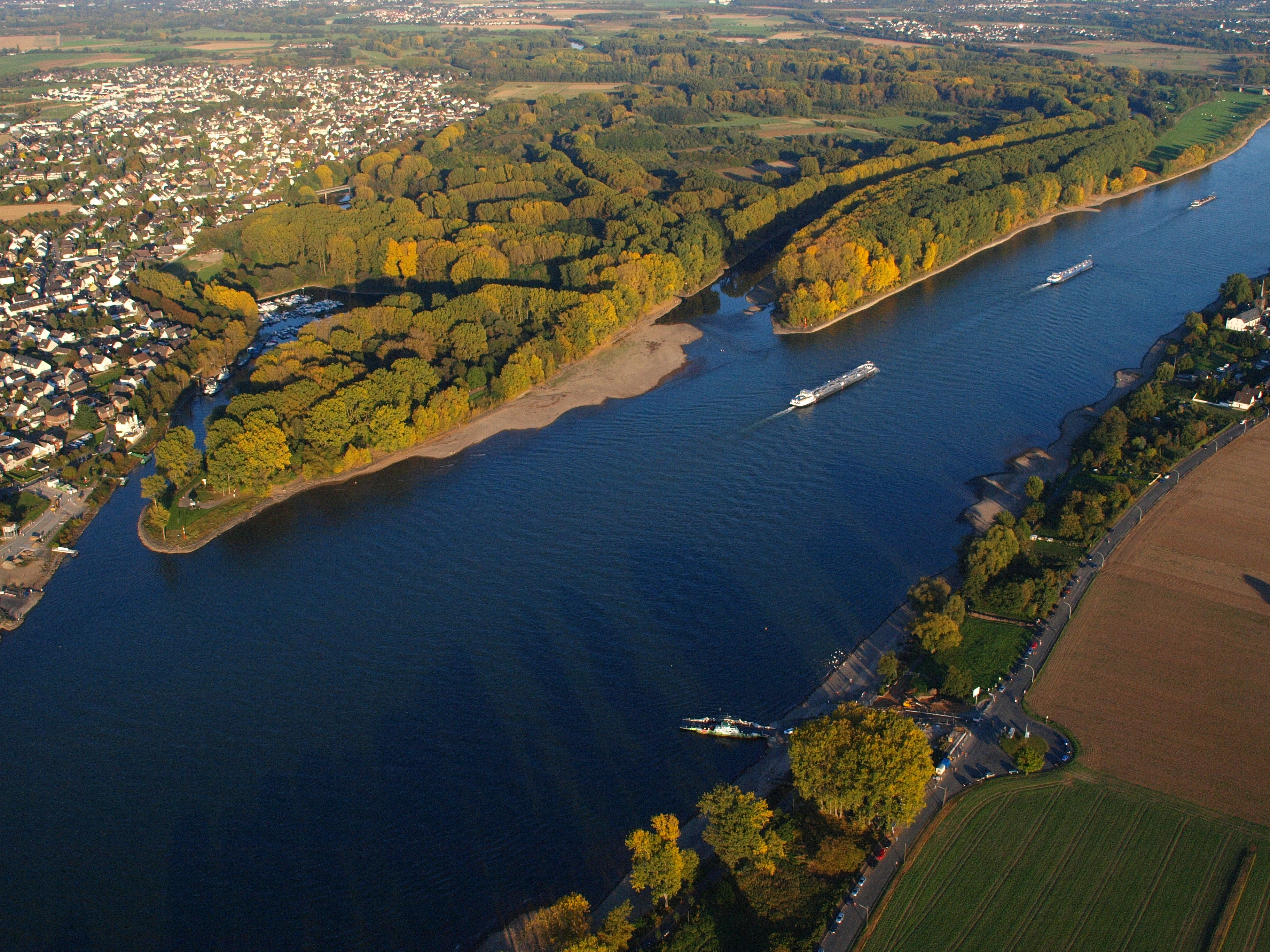 Siegmündung